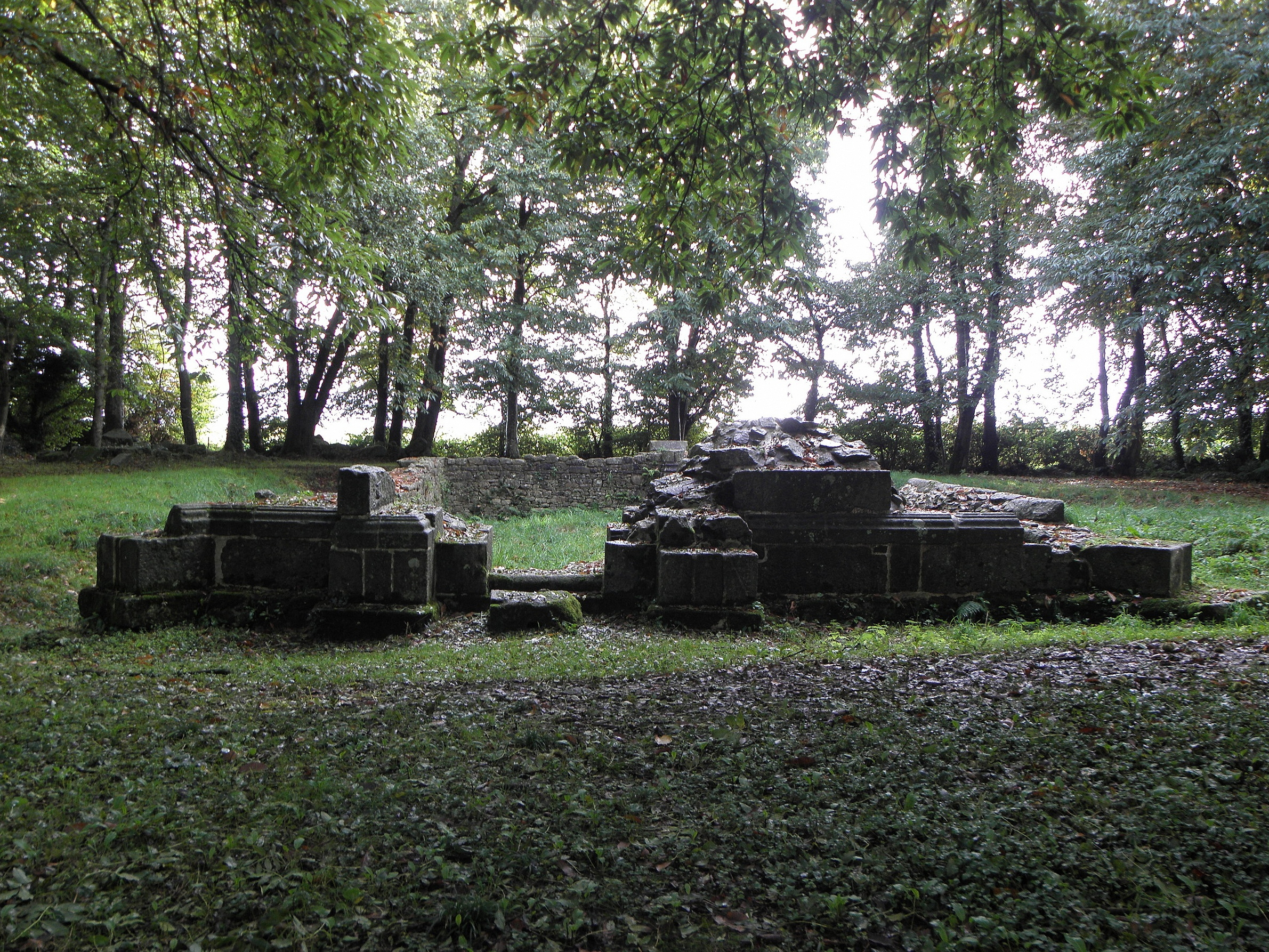 Entrée de la chapelle ruinée Notre-Dame de Lesquélen en Plabennec (29).